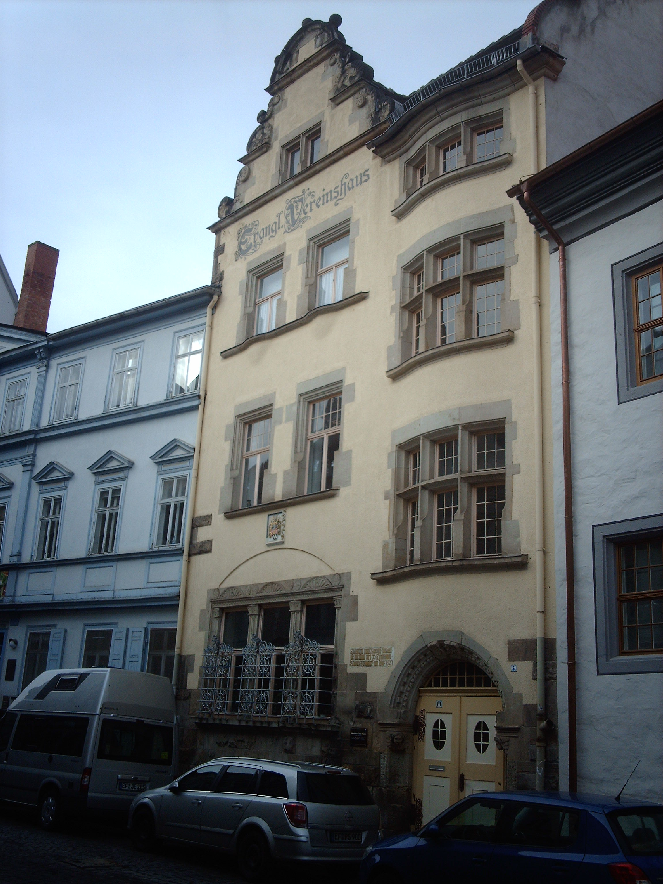 Evang. Vereinshaus oder Langehaus in Allerheiligenstraße 10 Erfurt